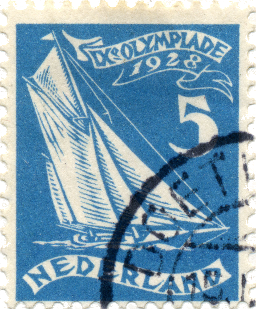 Olympiade-zegels (1928) Zeilen. Ontwerp Fokko Mees